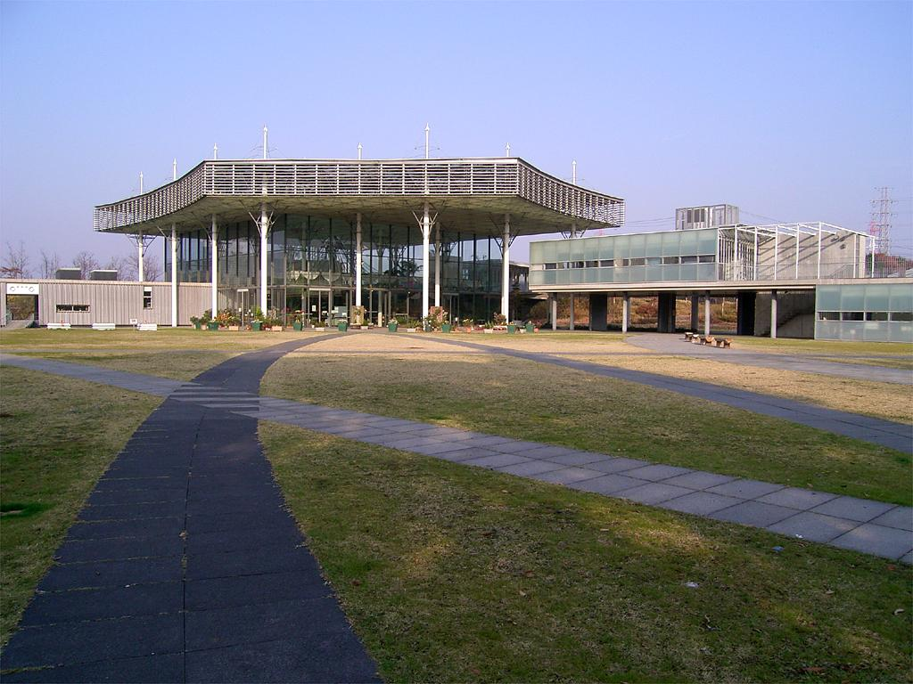 Hokusou Hananooka Park